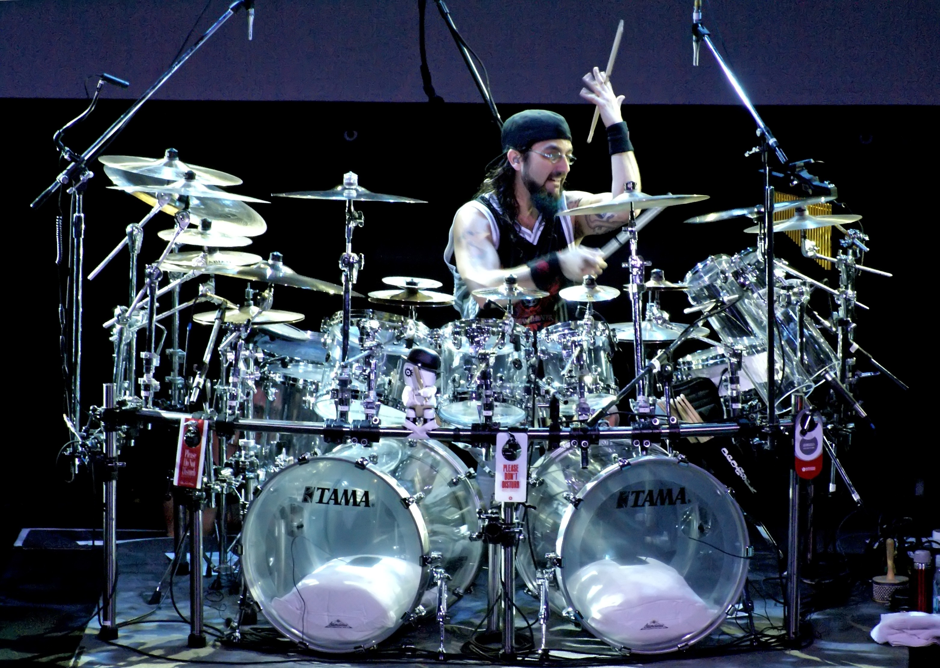 {pt}Mike Portnoy. Show Dream Theater no Rio de Janeiro dia 07/03/2008 Fotos tiradas do camarote central.